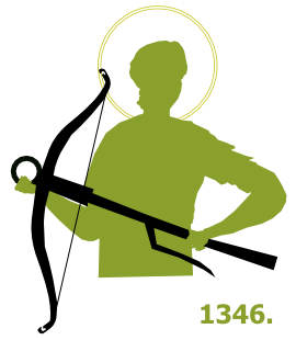 1346. samostrel sa freske u crkvi Pecke Patrijarsije.